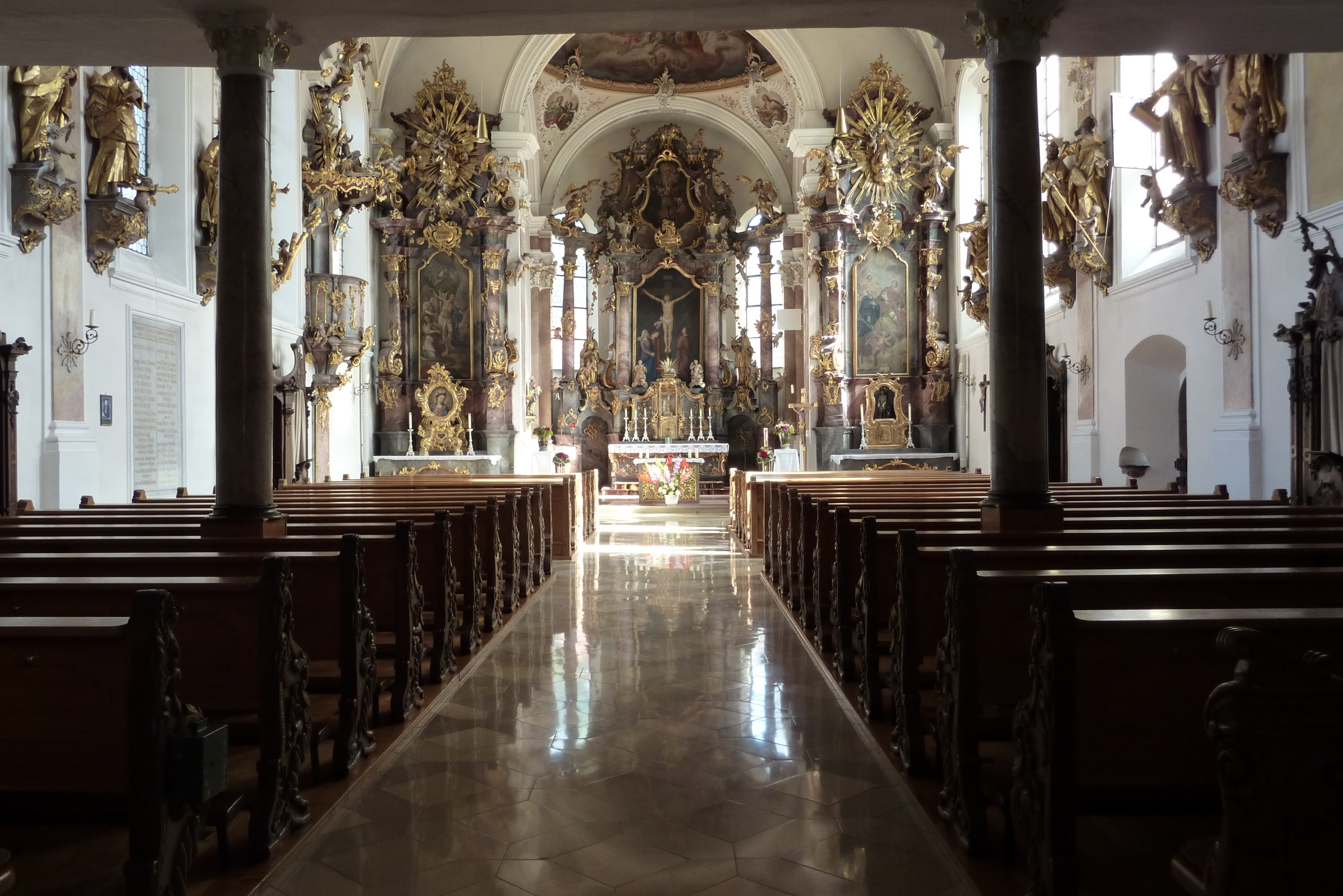 Katholische Pfarrkirche St. Vitus in Donaualtheim (Dillingen an der Donau), Langhaus und Chor